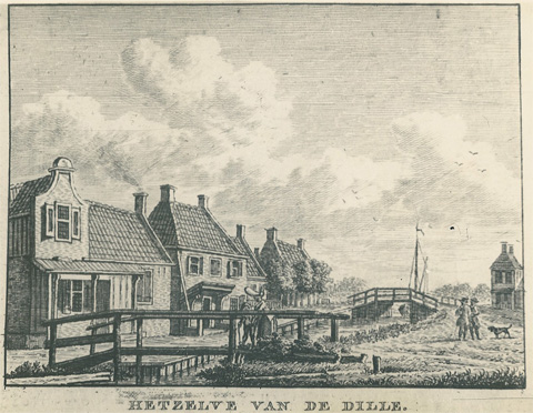 Afbeelding afkomstig uit de Tegenwoordige Staat van Friesland (1788). Tekenaar onbekend, mogelijk Cornelis Pronk, J. Gardiner Visscher of Jan Bulthuis rond 1750. View of Bolsward, Friesland, the Netherlands, around 1750